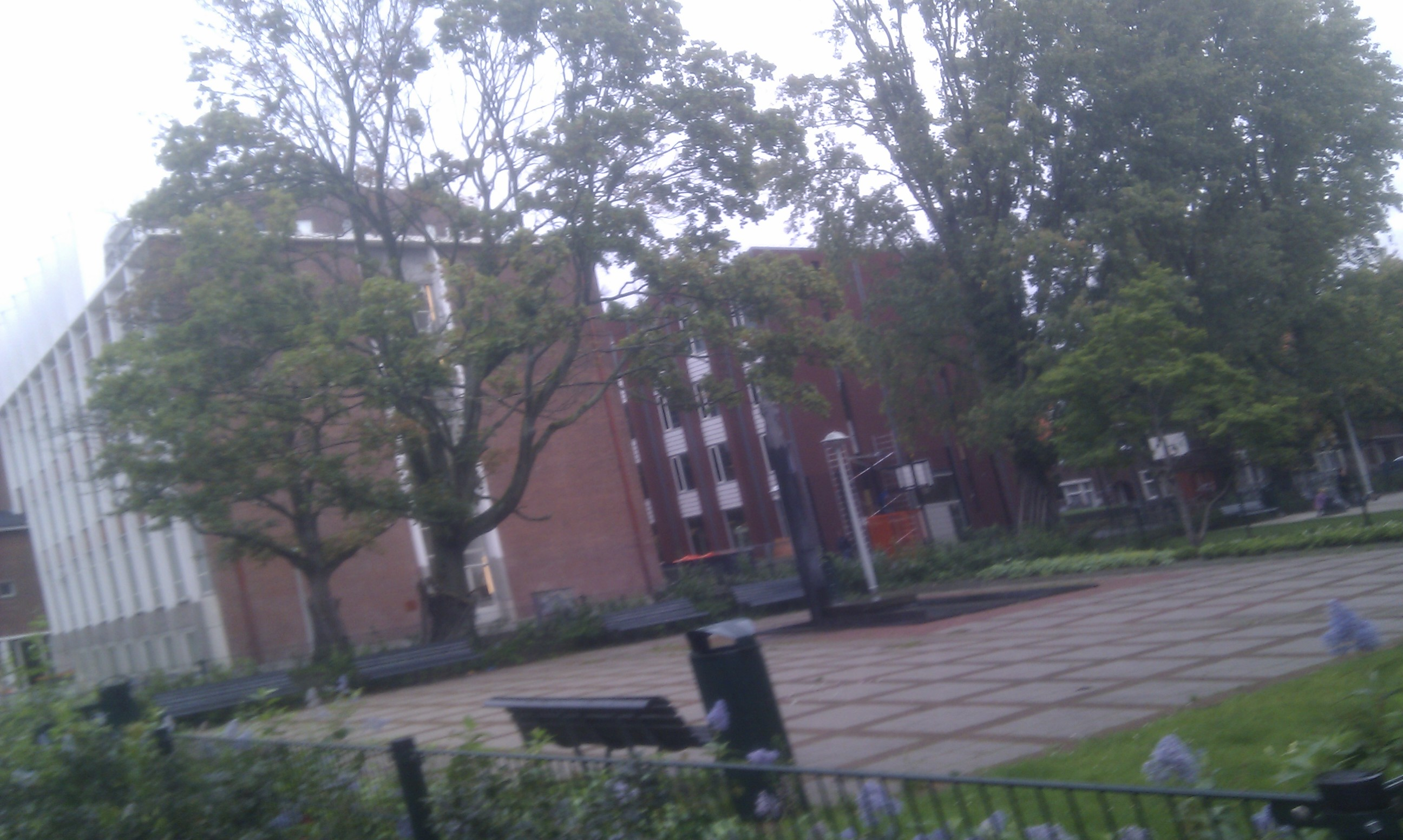 Het St. Ignatiusgymnasium aan de Jan van Eijckstraat en het Adama van Scheltemaplein in Amsterdam, gezien vanuit de Gerrit van der Veenstraat.